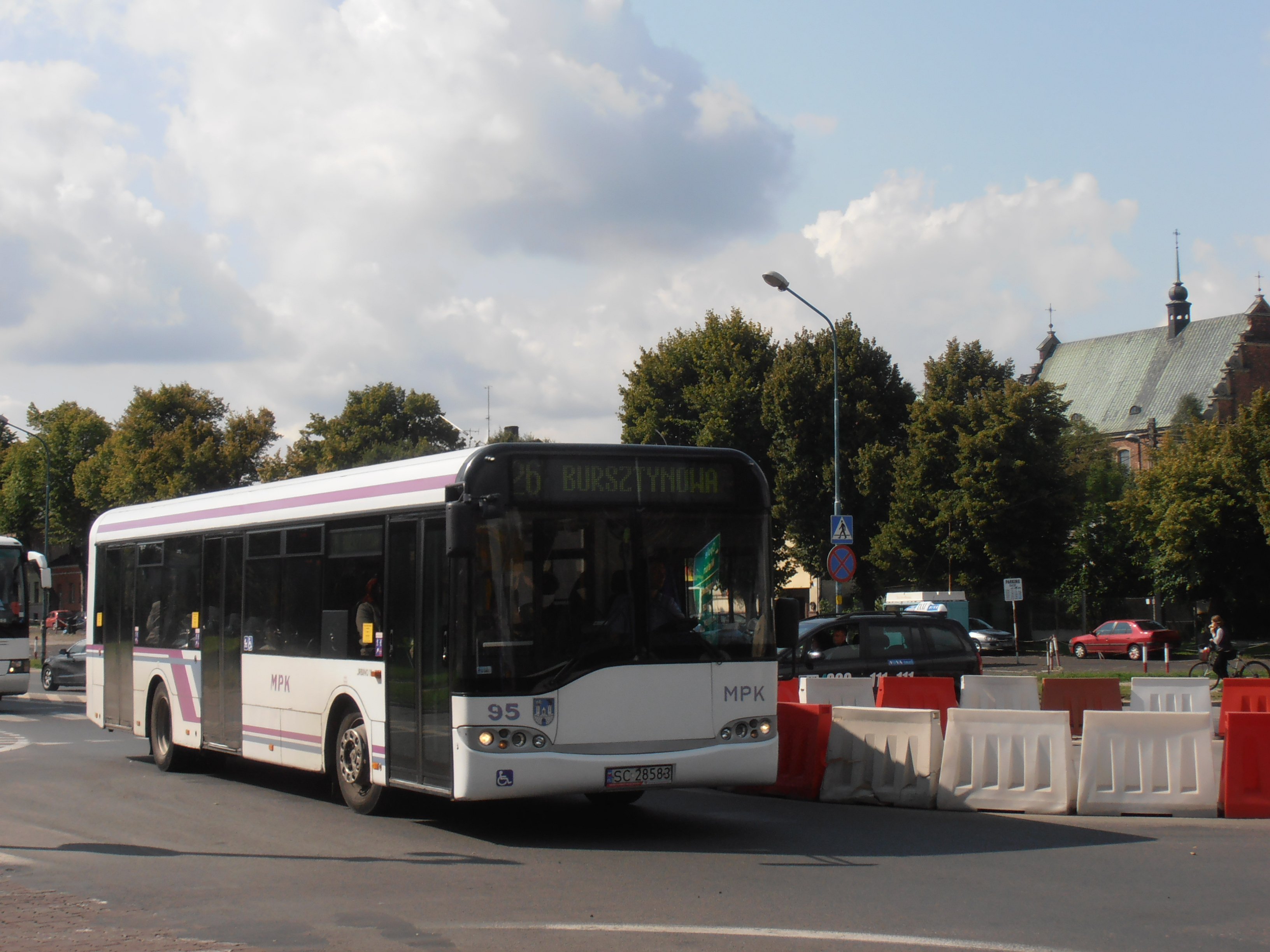 Solaris Urbino 12, Rynek Wieluński, Częstochowa, linia 26